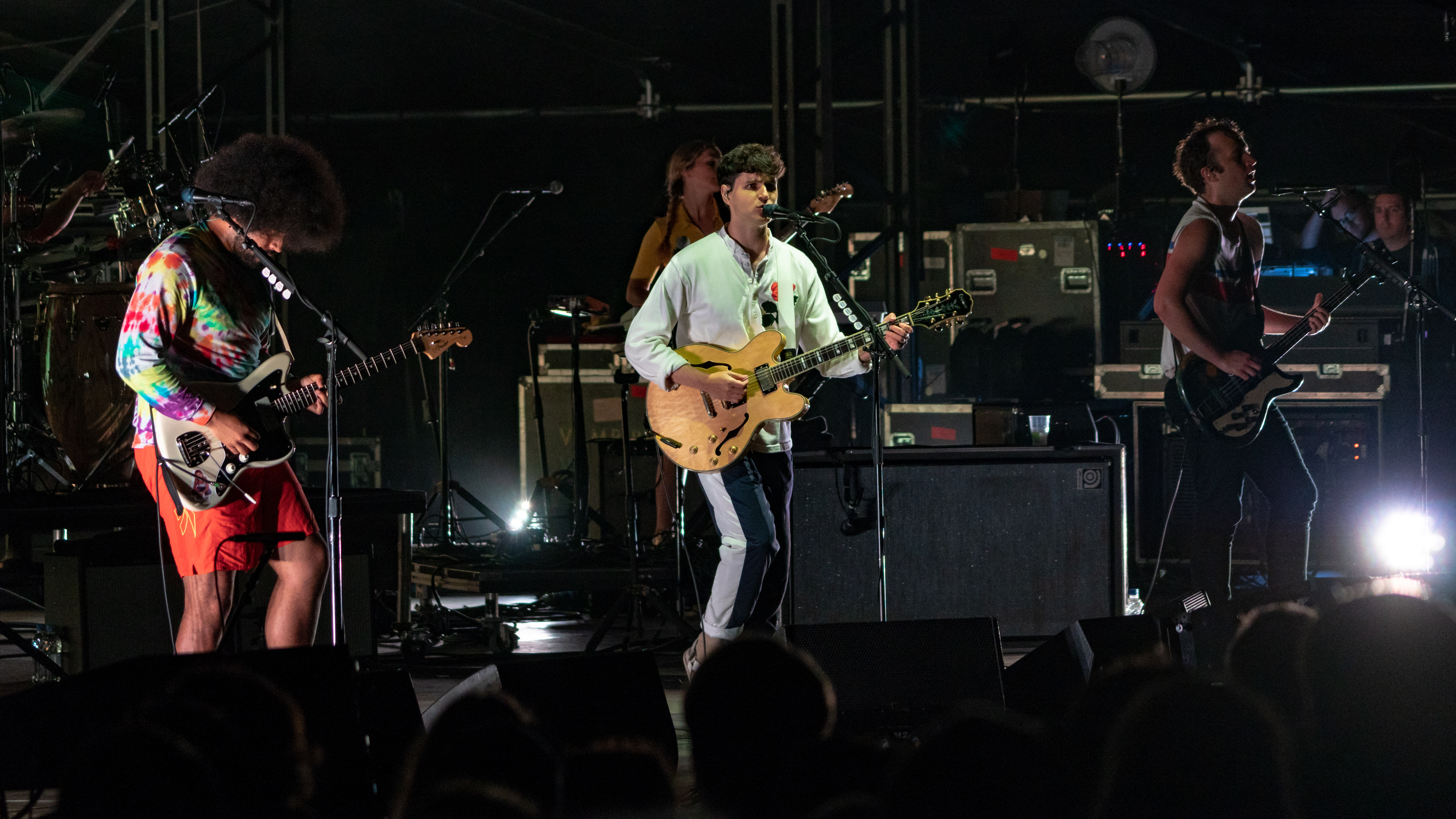 EOTR010918-98